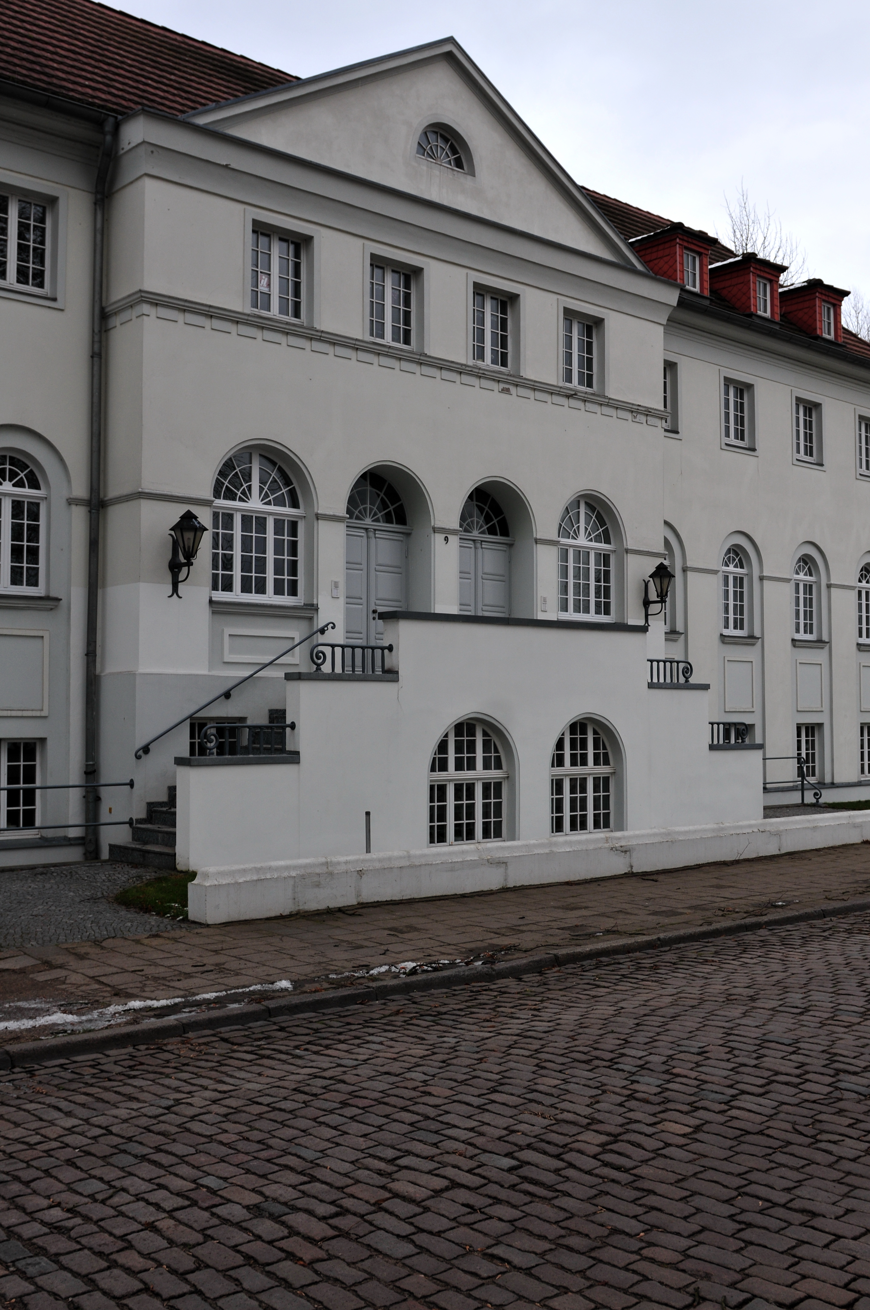 Schwerin